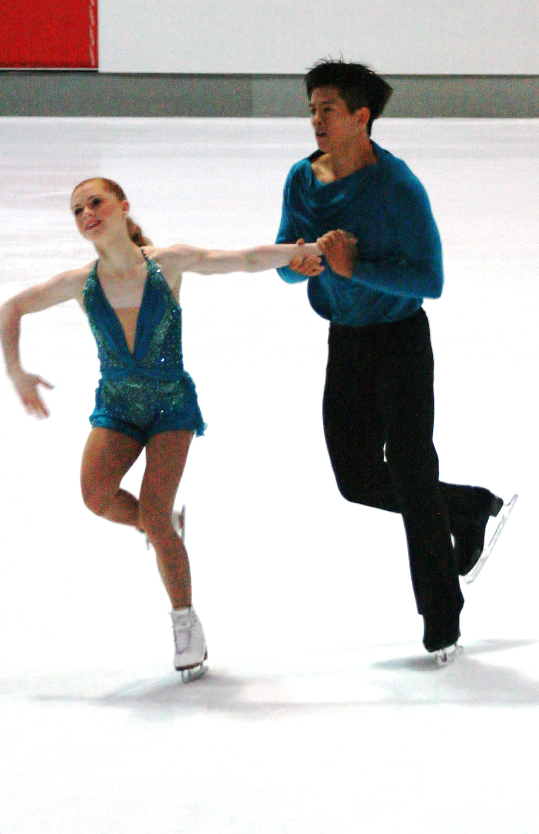 Наташа Пурич и Мервин Тран (Канада) на 2013 Nebelhorn Trophy